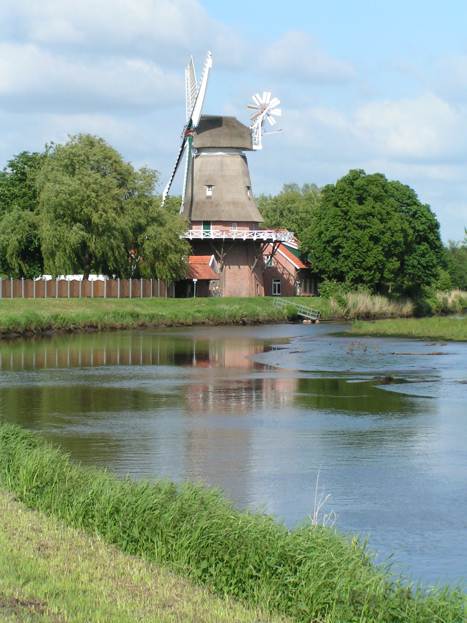 Windmühle Hengstforde